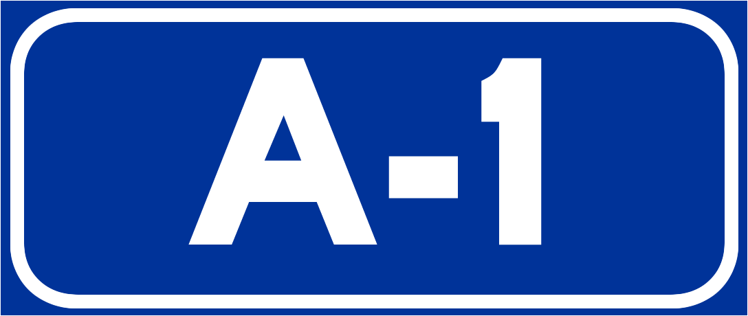 Nummernschild der Autovia A-1 in Spanien.